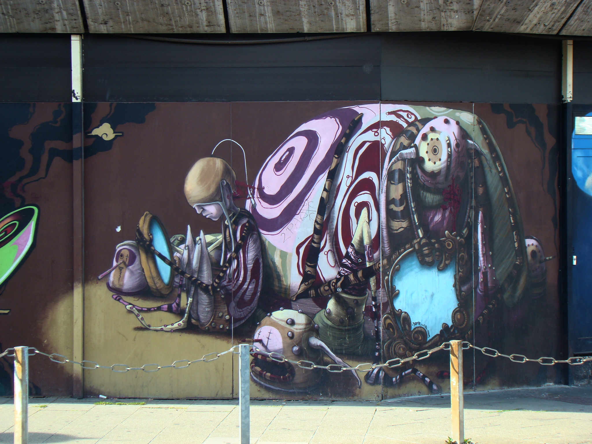 Graffiti am Wollhauszentrum in Heilbronn. Auftragsarbeit. Artist: Don.